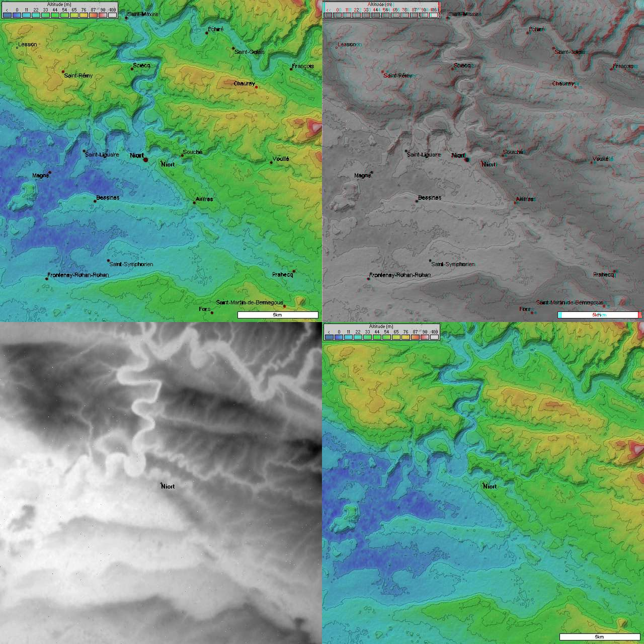 4 images topographique (20 km de coté) de Niort prisent par la mission SRTM. Image topographique + position des villes image topographique en relief + position des villes image topographique en niveau de gris (utile pour displacement map dans les logiciel 3D) Image topographique sans les villes Générée par le logiciel Radiomobile à partir des données domaine public de la mission SRTM de la NASA.